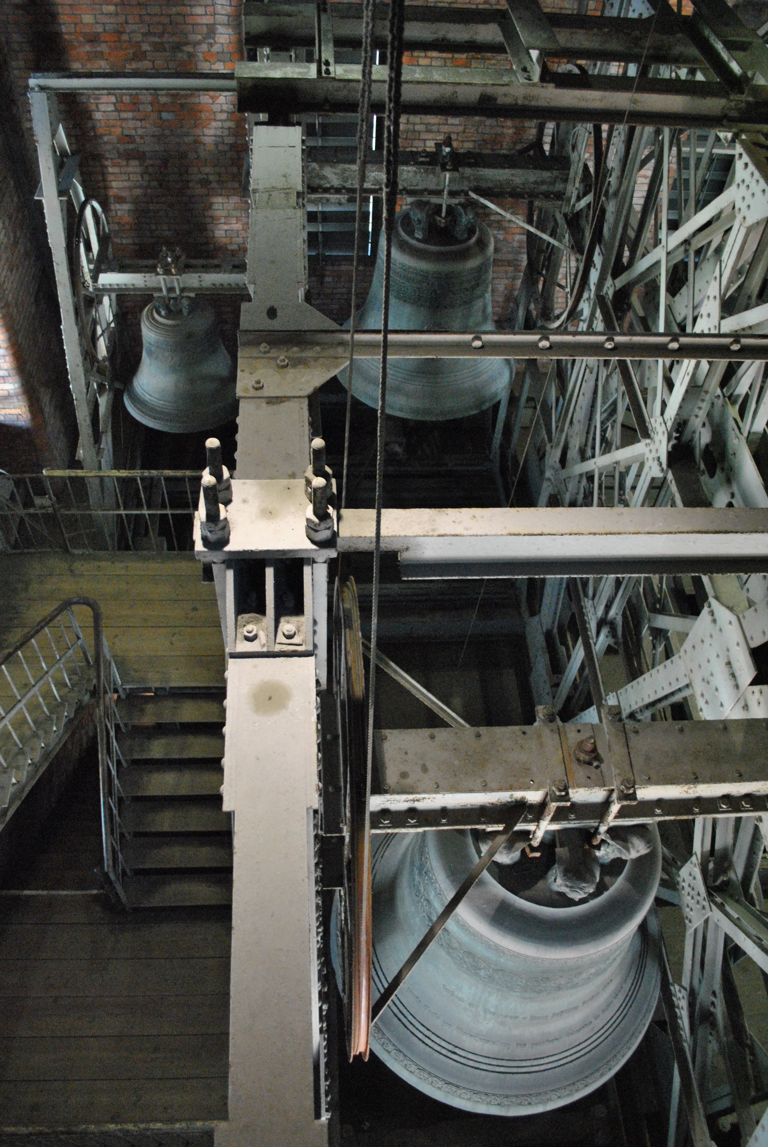 Glocken der Hauptkirche St. Petri zu Hamburg. Hinten links Glocke 3, daneben Glocke 2, vorne Glocke 1.